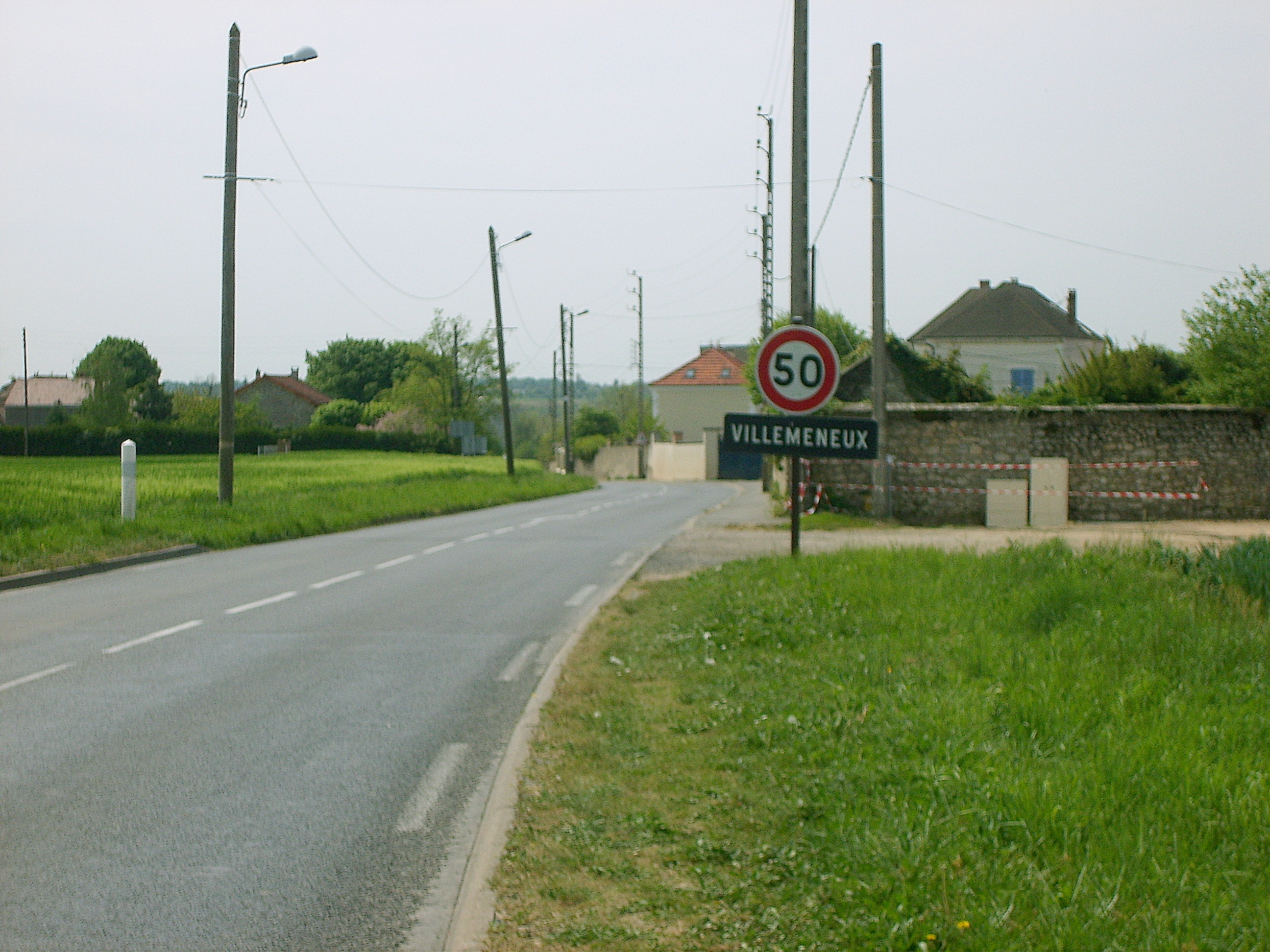 Je suis l'auteur de l'image 77bcr77 24 avril 2007 à 13:58 (CEST), crée le mardi 24 avril 2007